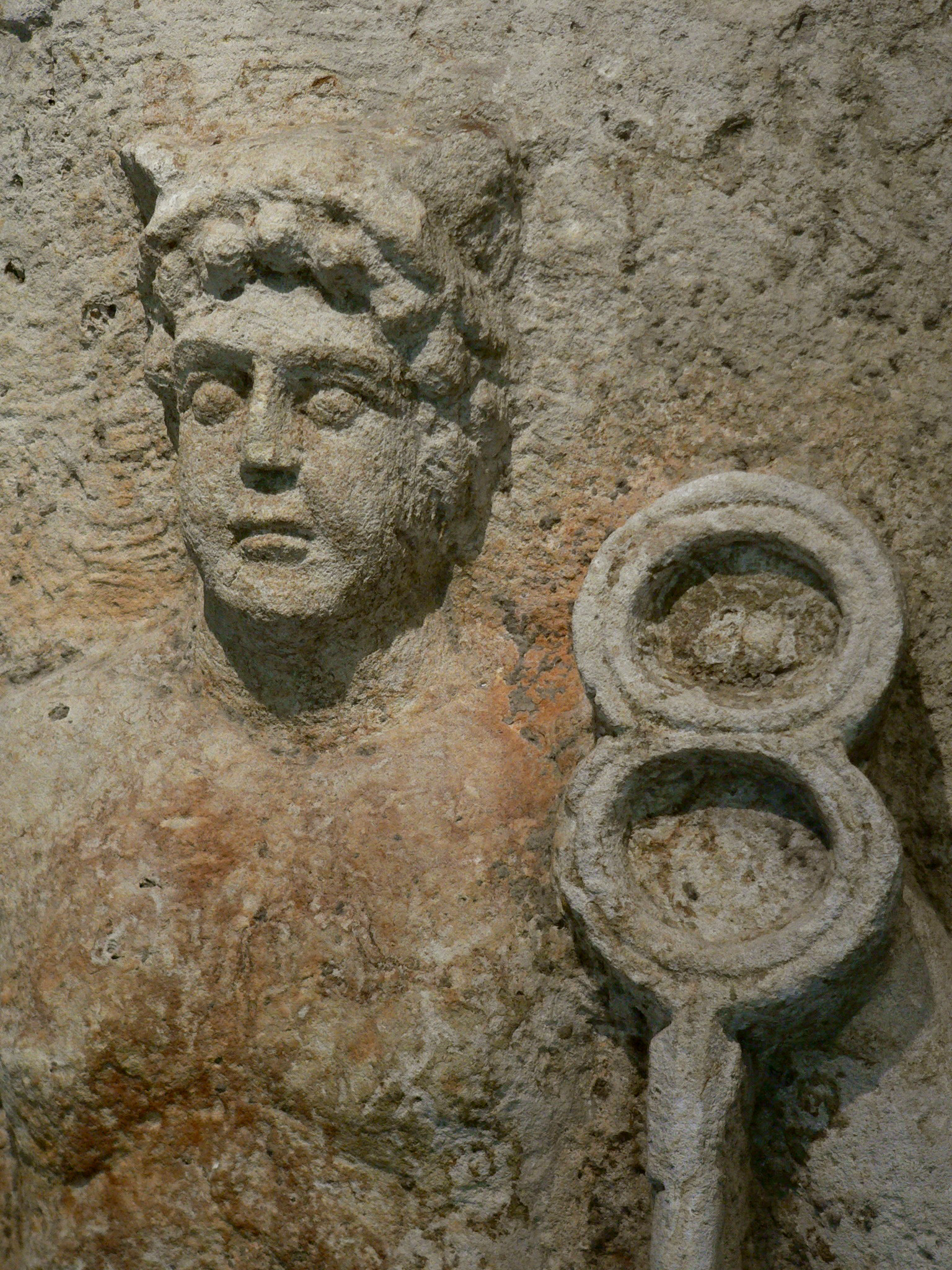 Stèle de Mercure, détail Stèle de Mercure au grand caducée, calcaire, Époque gallo-romaine, lieu de découverte: Hôtel-Dieu, 1867. Voir la stèle Musée Carnavalet Photographe: Clio20